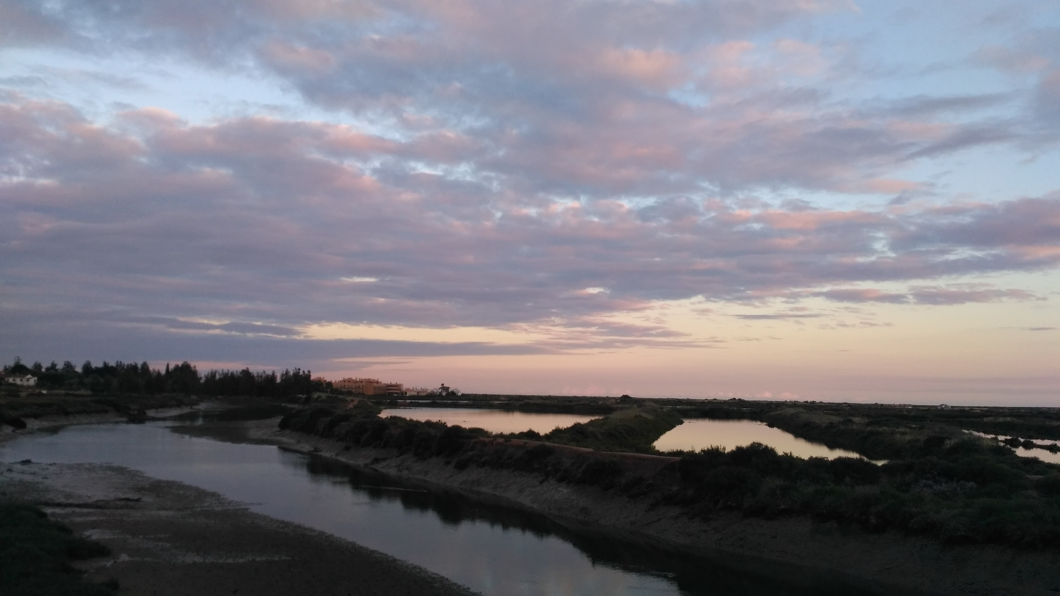 Troço da Ribeira da Almargem a jusante da ponte ferroviária.